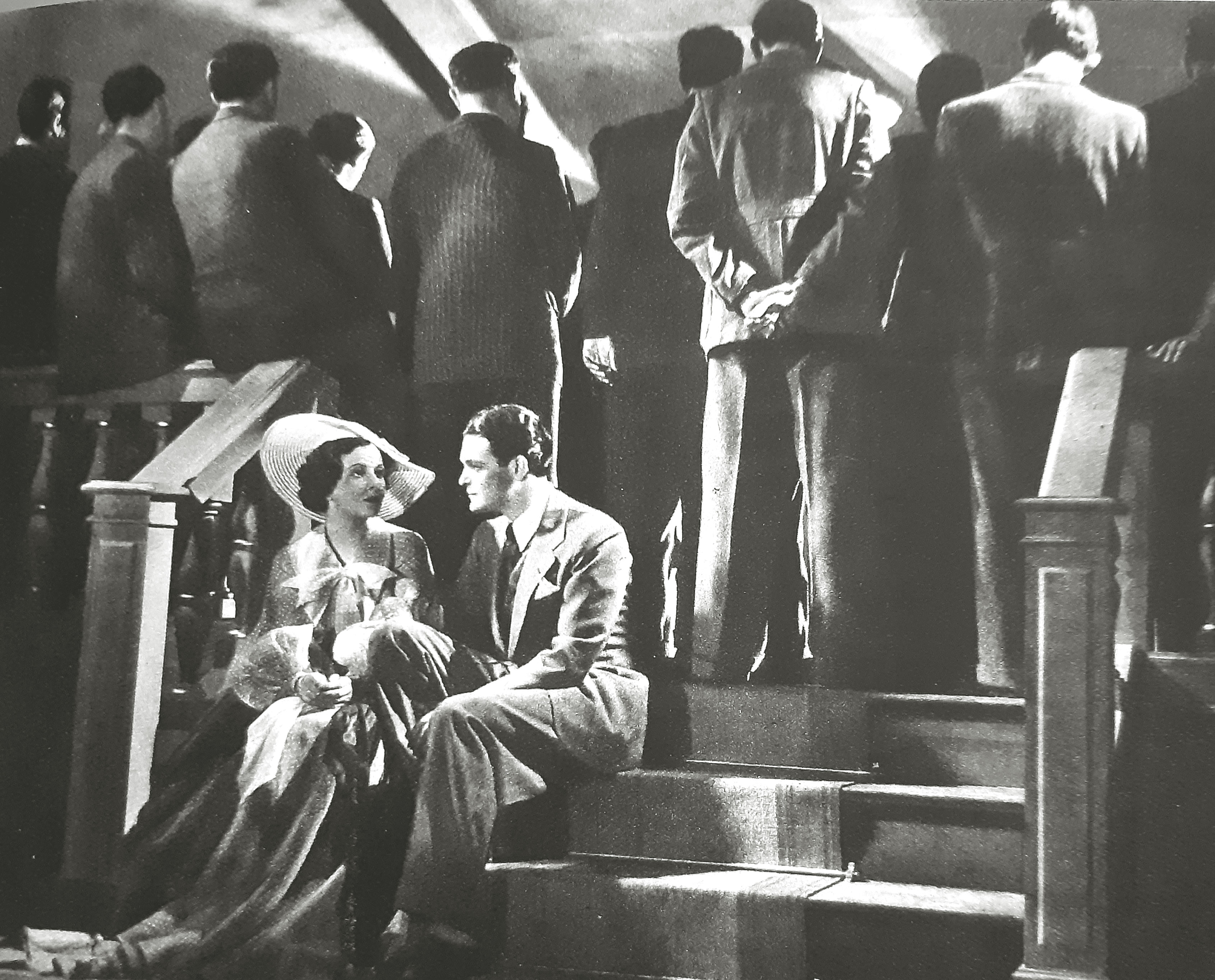 Ballerine regia G. Machaty, prod A.F.I. Tirrenia 1936. Silvana Jachino + Antonio Centa